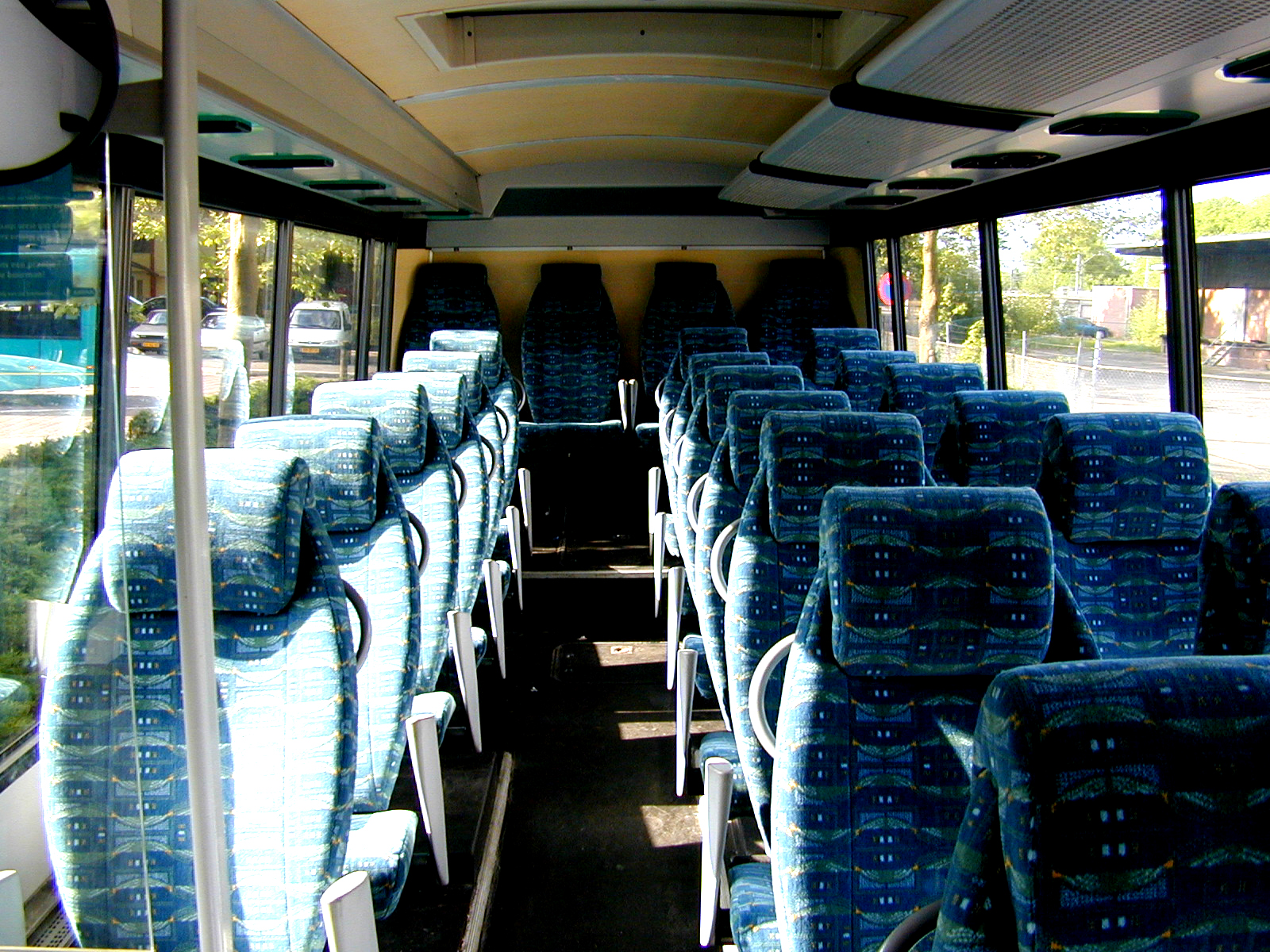 Interieur van de eerste generatie interliner bussen uit de 90er jaren. Hoewel de stoelen hetzelfde zijn gebleven, is de kleur van de bekleding wel vernieuwd.